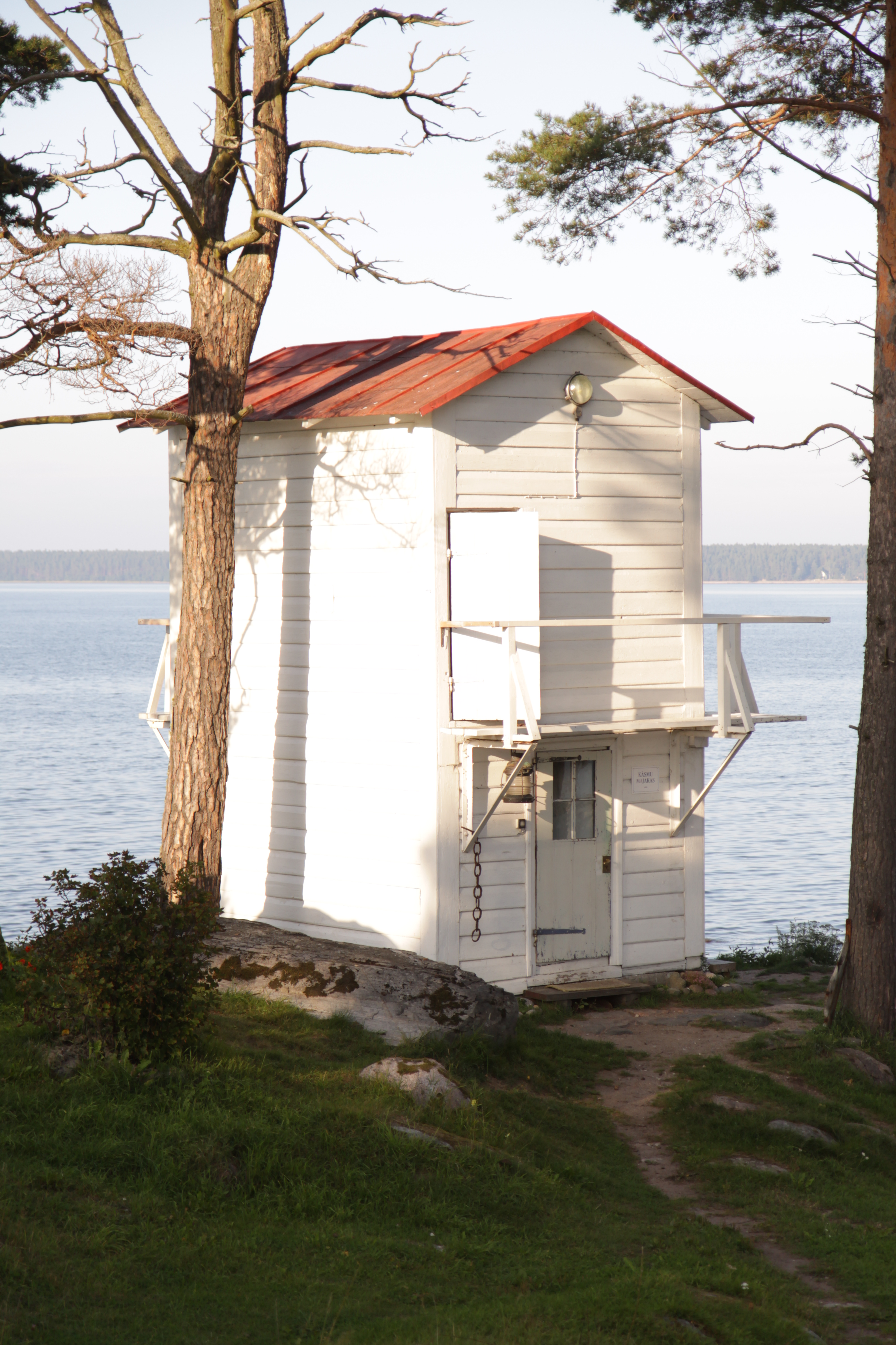 Käsmu tuletorn. Käsmu küla, Ranna tee 31